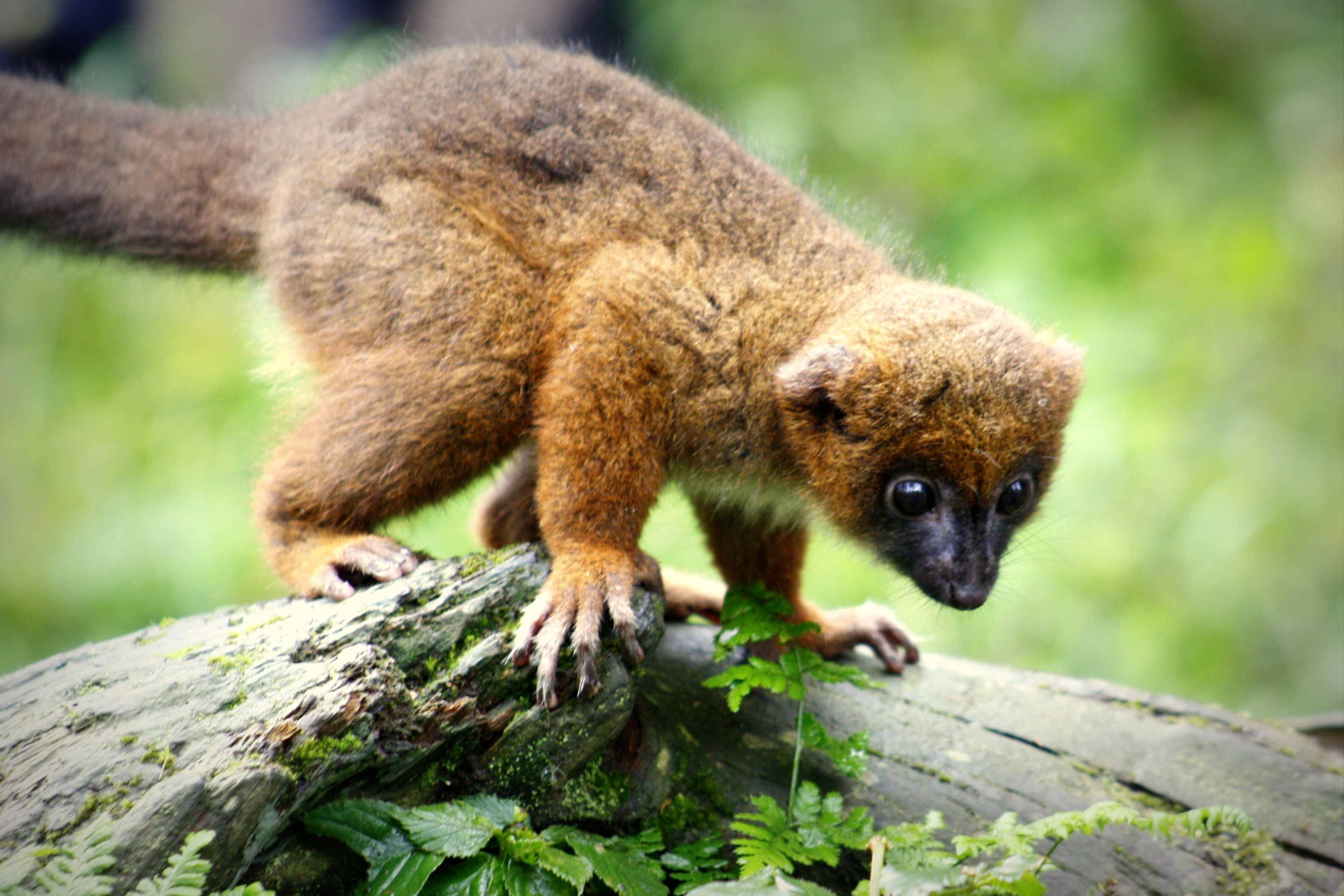 roodbuikmaki, foto genomen in Apenheul, Apeldoorn, Nederland